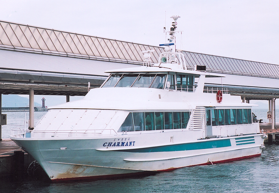 しゃるまん 高松港にて